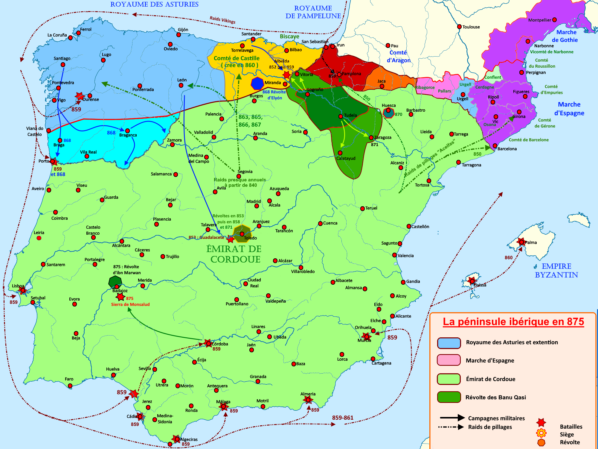 Carte de la péninsule de 850 à 875, retraçant les grands évènements de l'époque